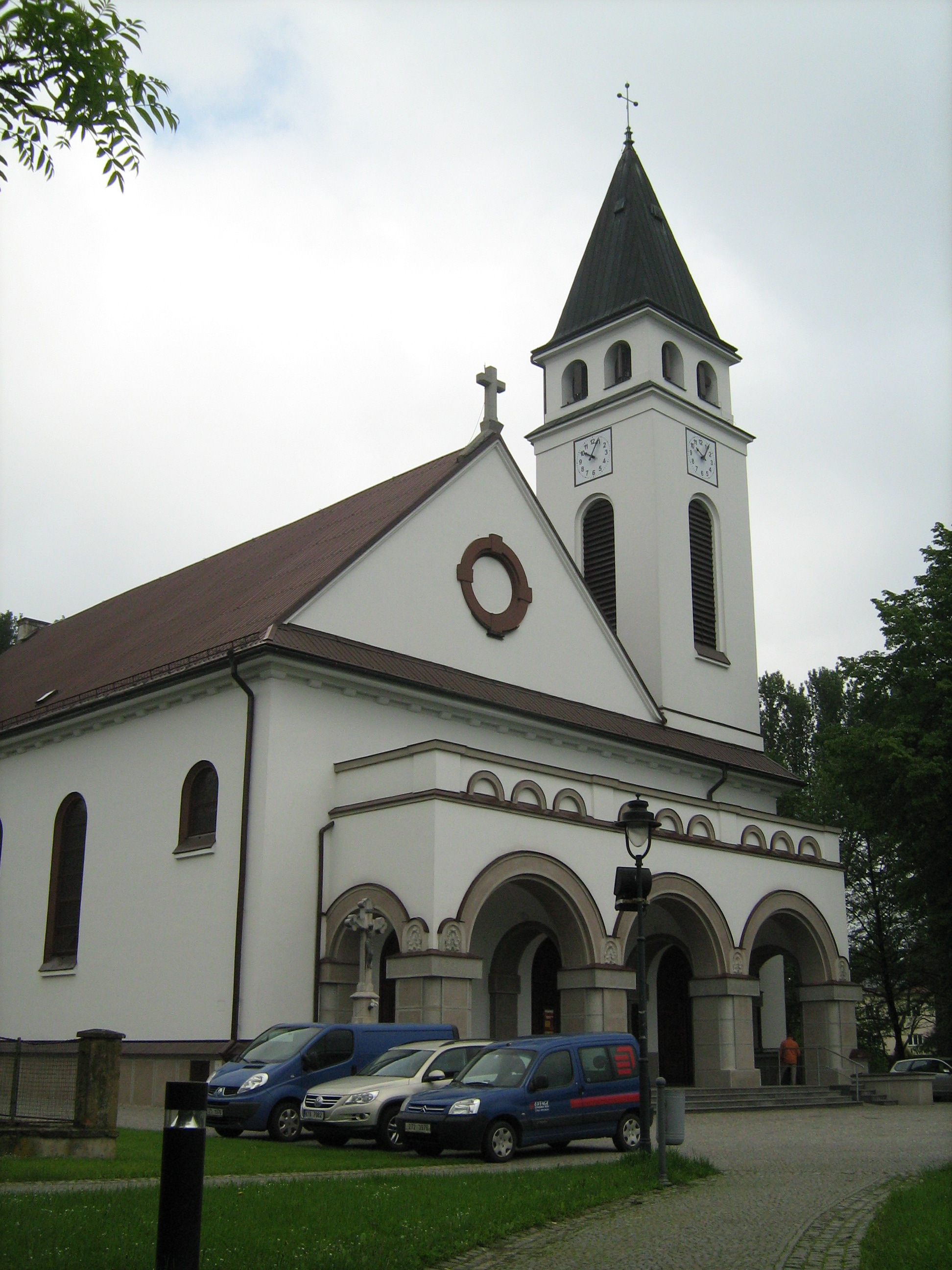 Česky: Kostel Krista Krále ve Svinově